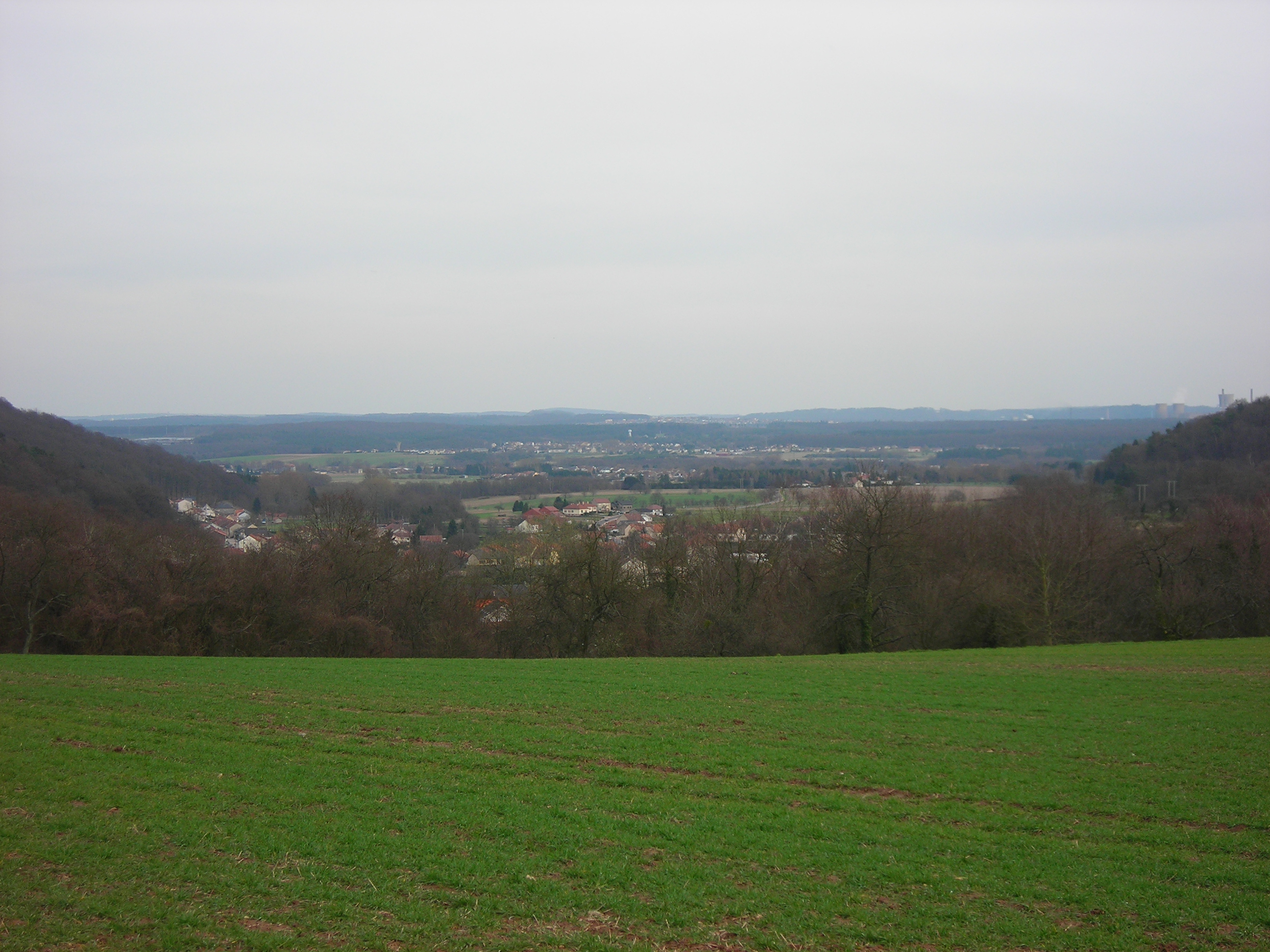 Guerting vu depuis le plateau vers Coume, Moselle, Lorraine, France